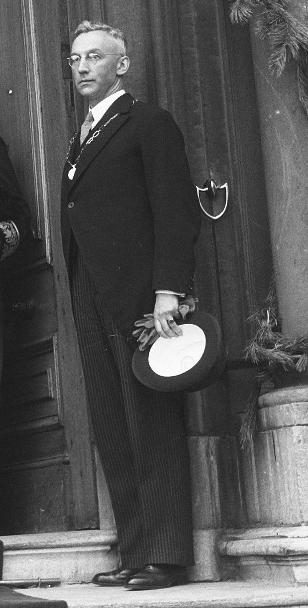 Collectie / Archief : Fotocollectie Anefo Reportage / Serie : [ onbekend ] Beschrijving : Koningin Juliana verlaat het stadhuis van Vlissingen Annotatie : vl nr. Prins Bernhard, koningin Juliana, W.F.K. Bischoff van Heemskerck, commissaris der Koningin A.F.C. de Casembroot , burgemeester B. Kolff Datum : 20 augustus 1950 Locatie : Vlissingen, Zeeland Trefwoorden : koninklijke bezoeken Persoonsnaam : Bernhard (prins Nederland), Bischoff van Heemskerck, W.F.K., Casembroot, A.F.C. de, Juliana (koningin Nederland), Kolff, B. Fotograaf : Pot, Harry / Anefo Auteursrechthebbende : Nationaal Archief Materiaalsoort : Glasnegatief Nummer archiefinventaris : bekijk toegang 2.24.01.09 Bestanddeelnummer : 904-1409